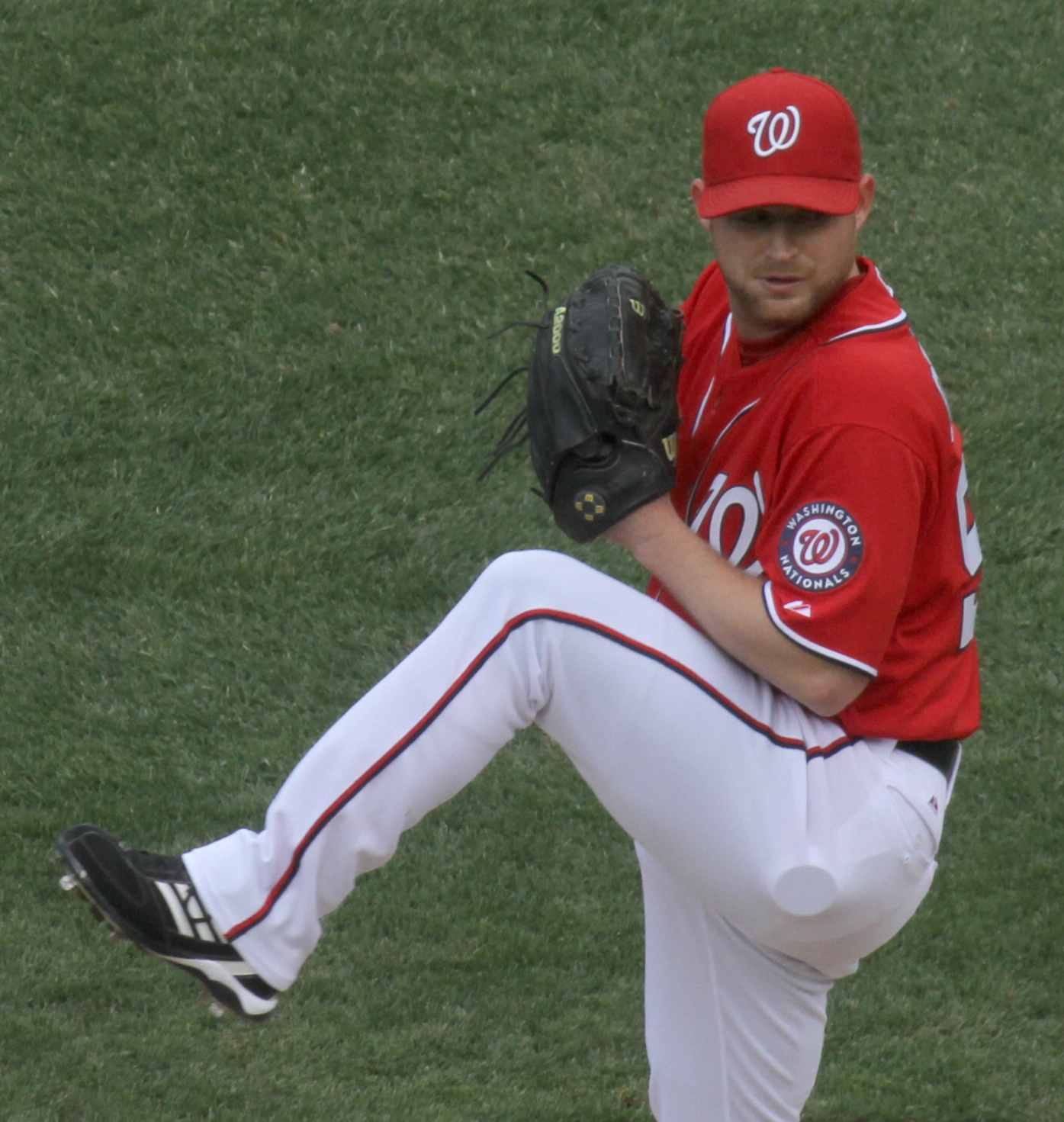 Chad Gaudin